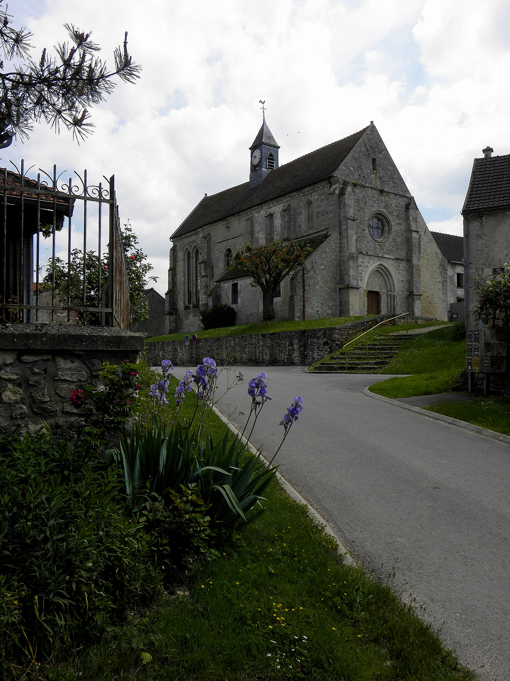 Église Saint-Jean-Baptiste de Priez (02).